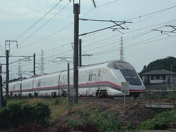 Akita Shinkansen Komachi 2005/09/10